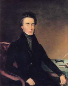 John Boulton Townly